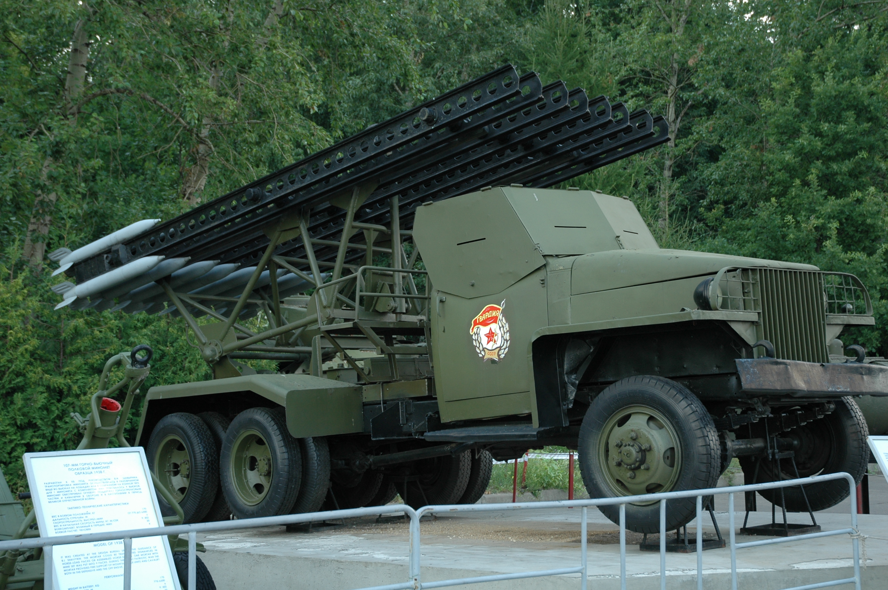 Katyusha Launcher on a Studebaker US6 Truck